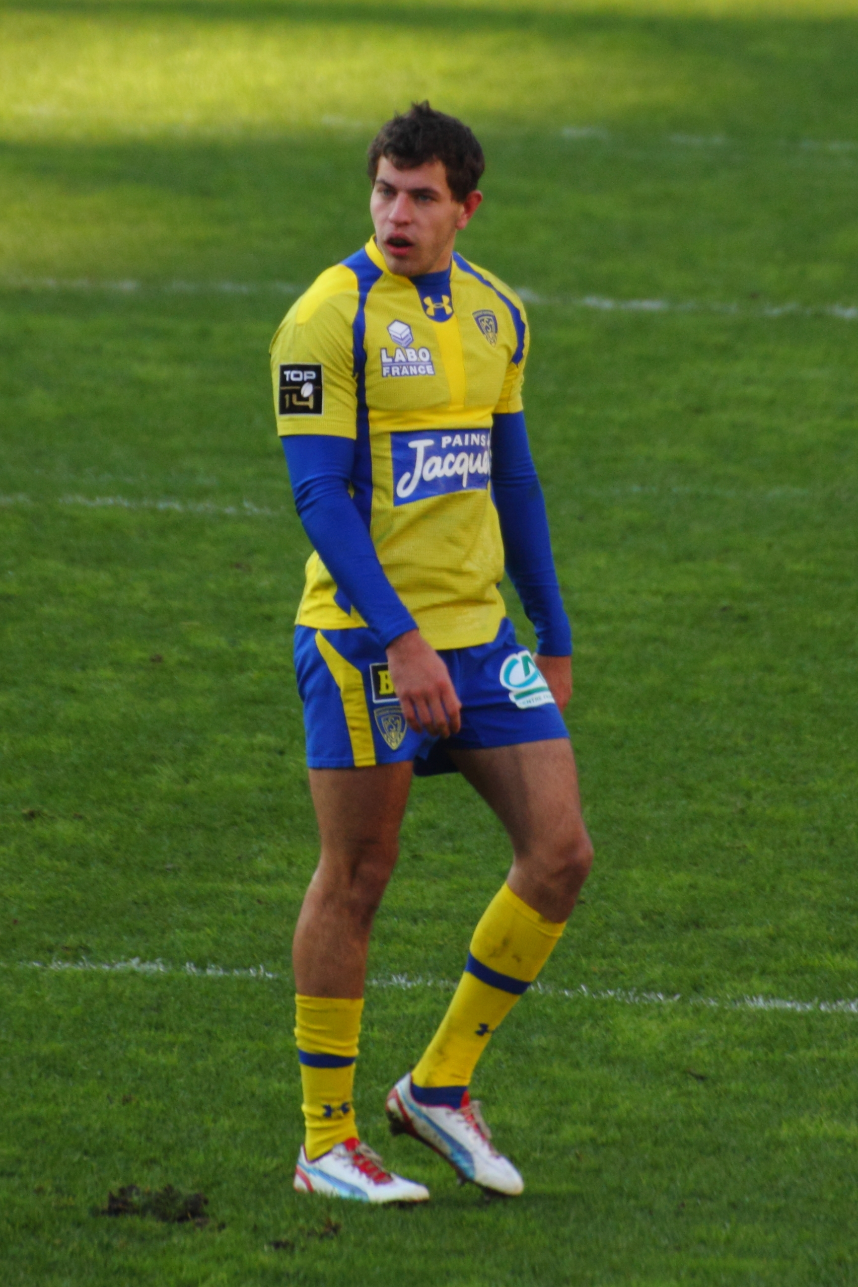 Top 14 2012-2013 — 1 décembre 2012, Stadium de Toulouse. Match between: Stade toulousain — ASM Clermont-Auvergne